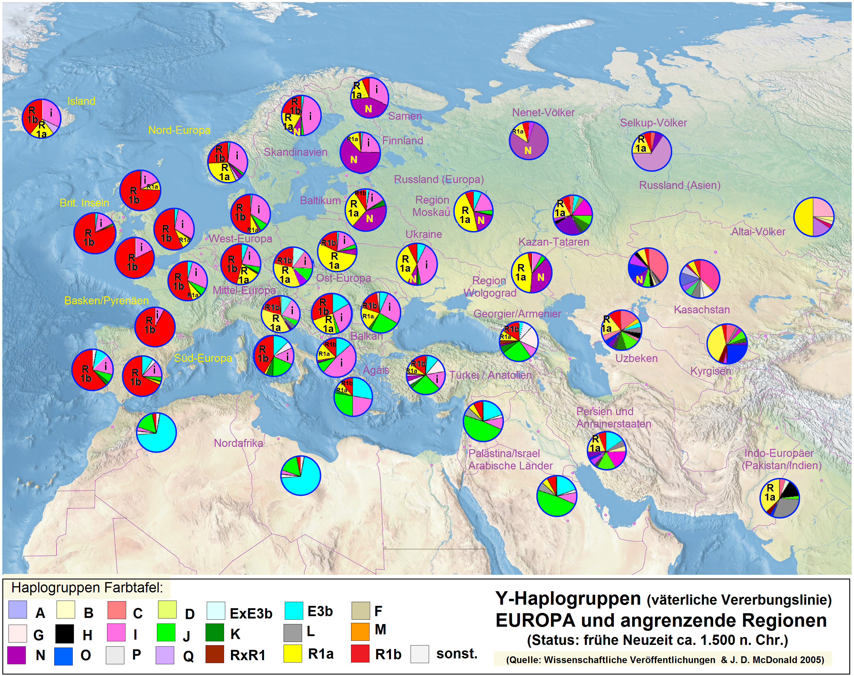 Y-Chromosom-Haplogruppenverteilung Europas in der Neuzeit. Besonders dominant die Haplogruppe R (östlich mit R1a und westlich mit R1b) sowie die Gruppe I.